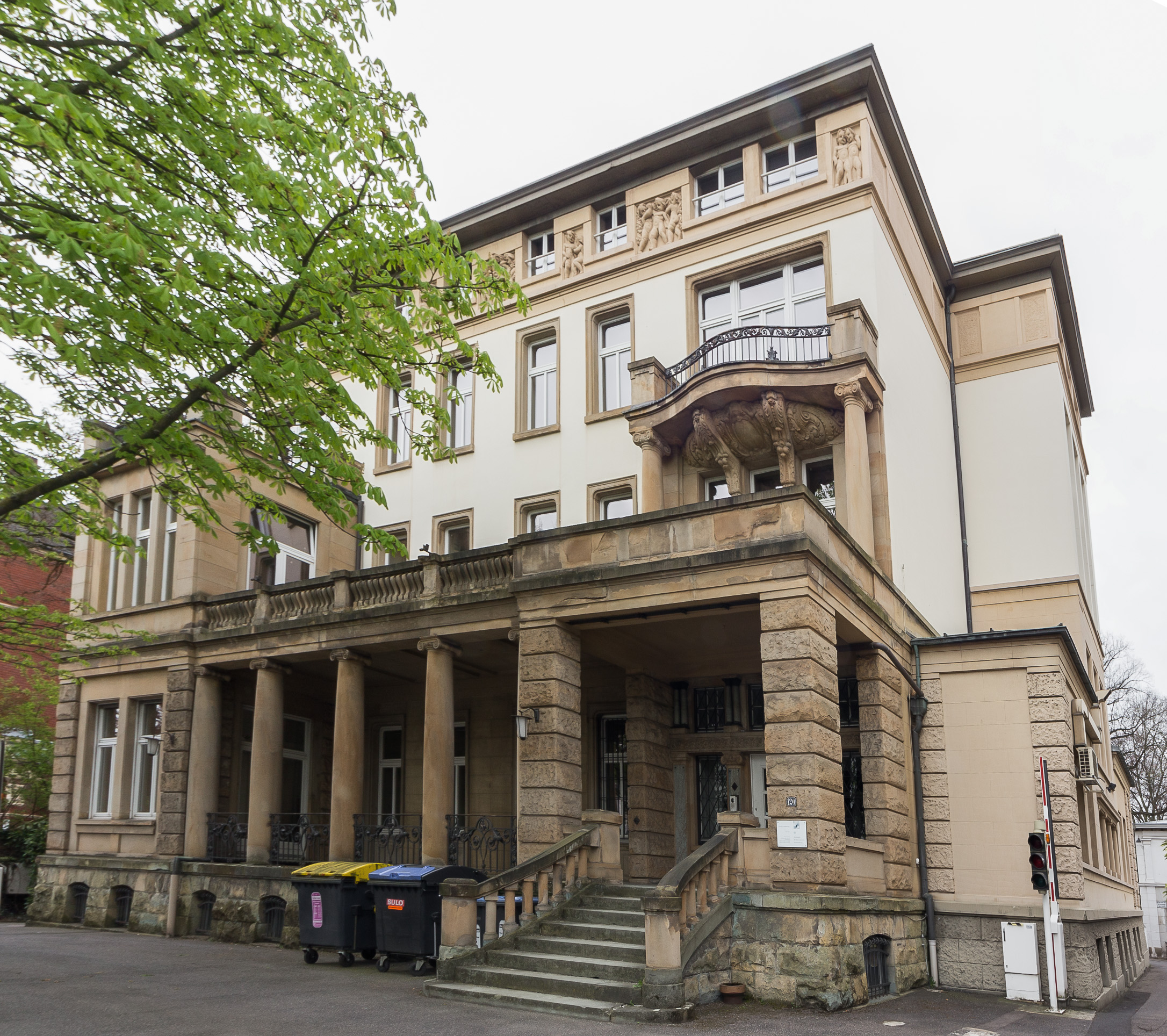 Villa Adenauerallee 120–122, Bonn